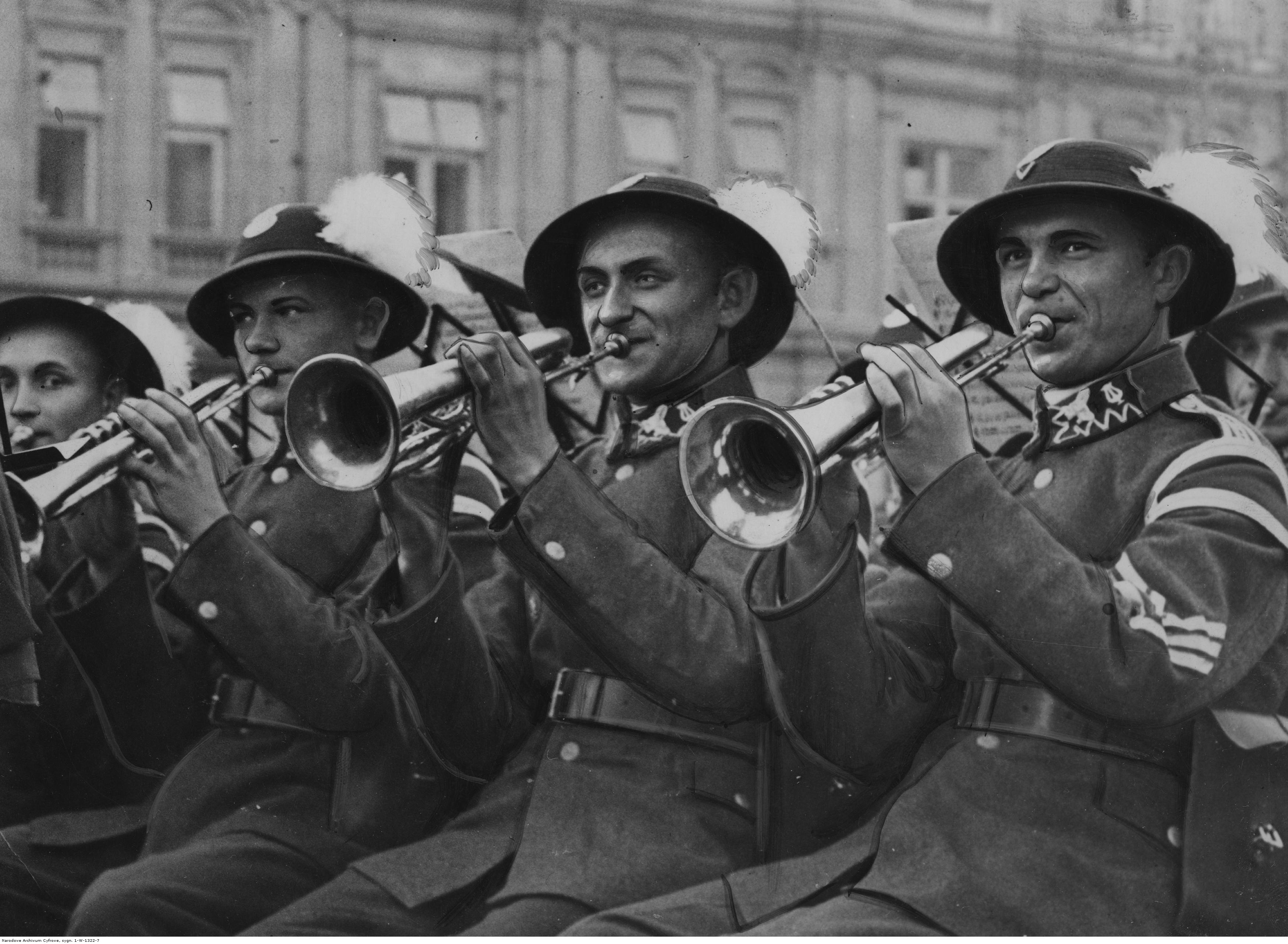 Wizyta 5 Pułku Strzelców Podhalańskich w Krakowie - trębacze w orkiestrze pułkowej. Koncern Ilustrowany Kurier Codzienny - Archiwum Ilustracji. Sygnatura: 1-W-1322-7